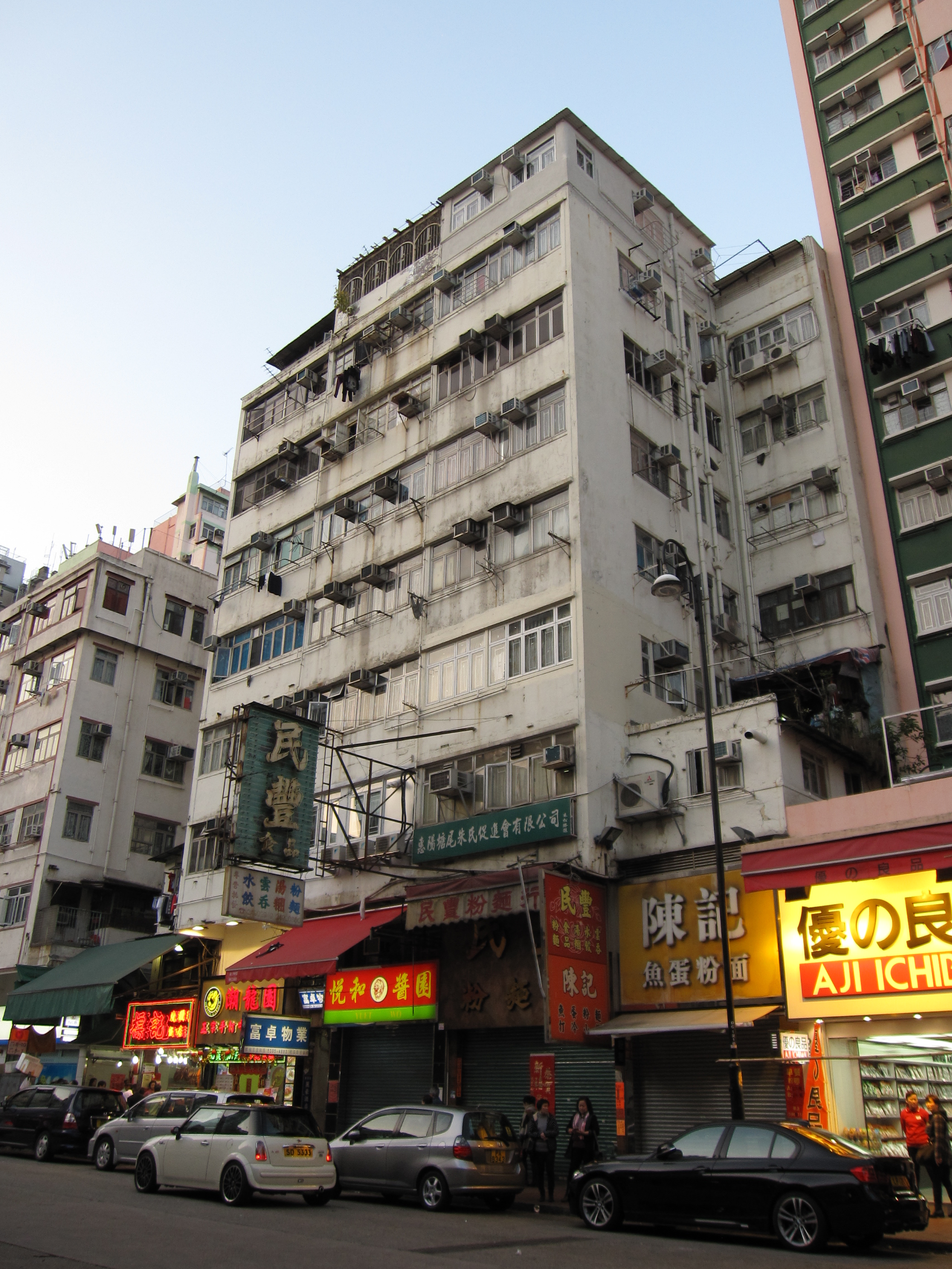 中文（香港）: 德仁樓第八期。